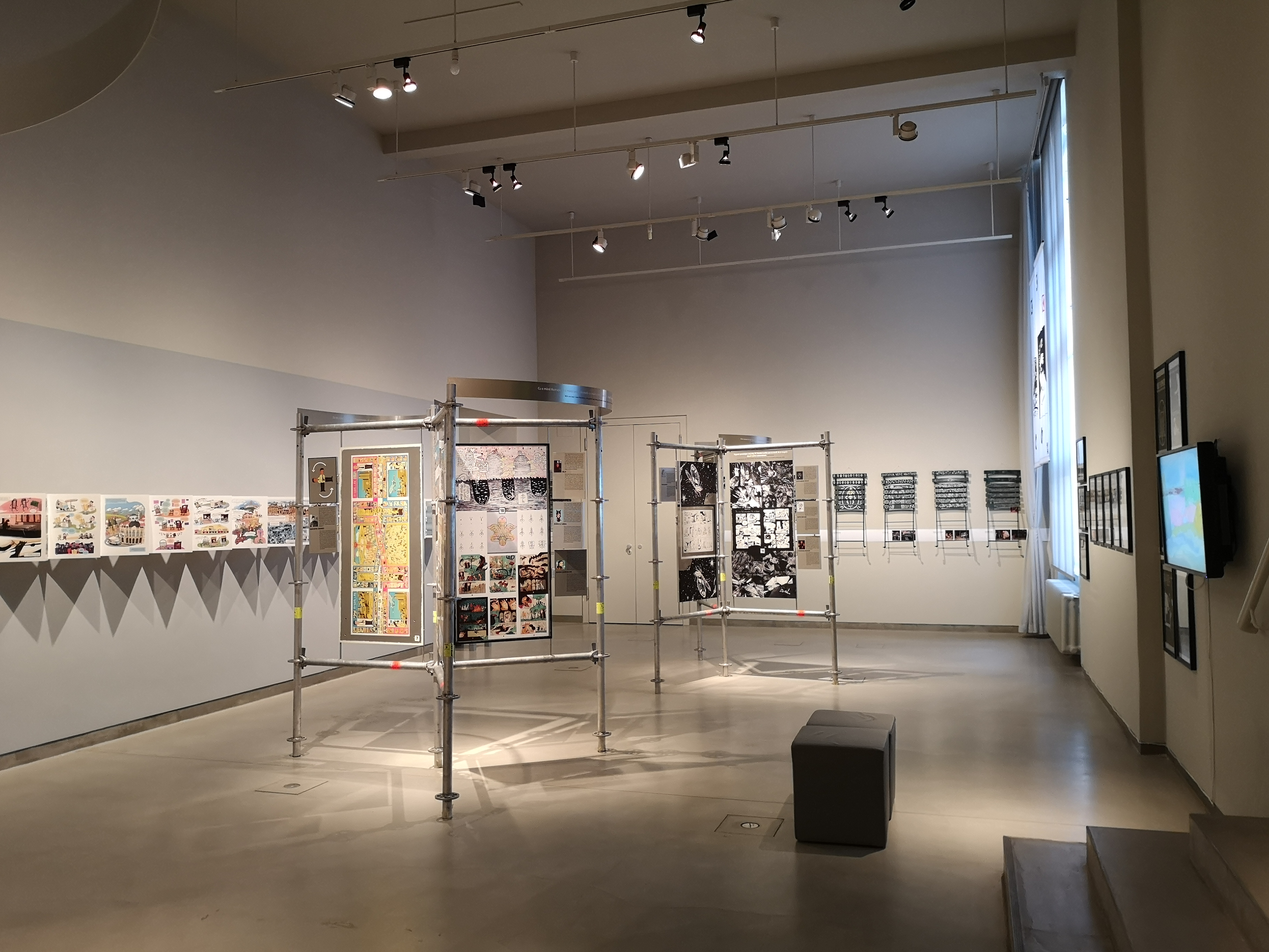 Blick in die Ausstellung im Museum Europäischer Kulturen